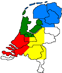 Description Dekkende regio's per helikopter Date3 March 2007SourceEigen creatie met paint op basis van de afbeelding: Image:Provinces of the Netherlands.svg van wikimedia commons.Authornl:Gebruiker:Basjuh Dekkende regio's per helikopter